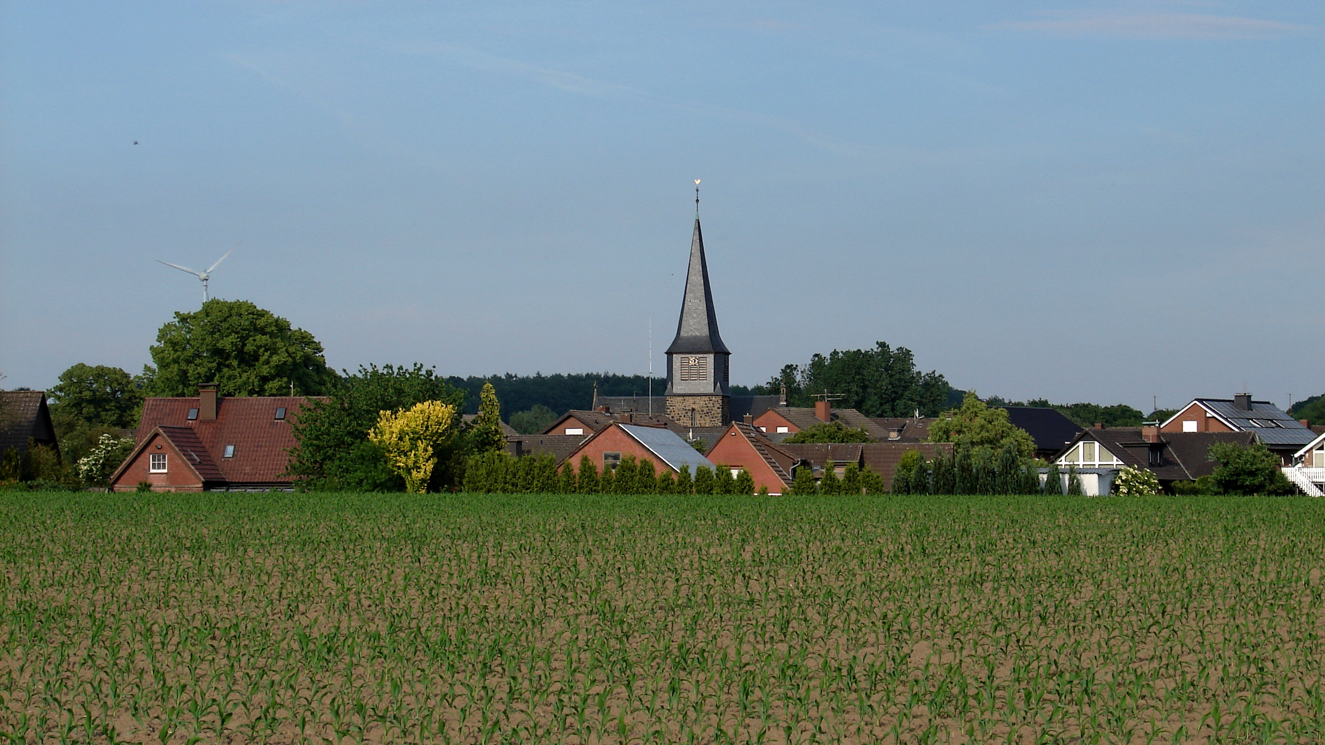 Klein Reken ist ein Ort in der Gemeinde Reken in Nordrhein-Westfalen. Bis 1969 war Klein Reken eine eigene Gemeinde.